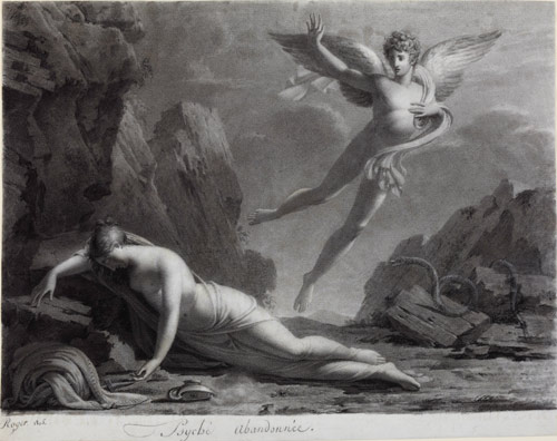 Dessin au fusain et gravure de Barthélemy Roger (1770-1841)